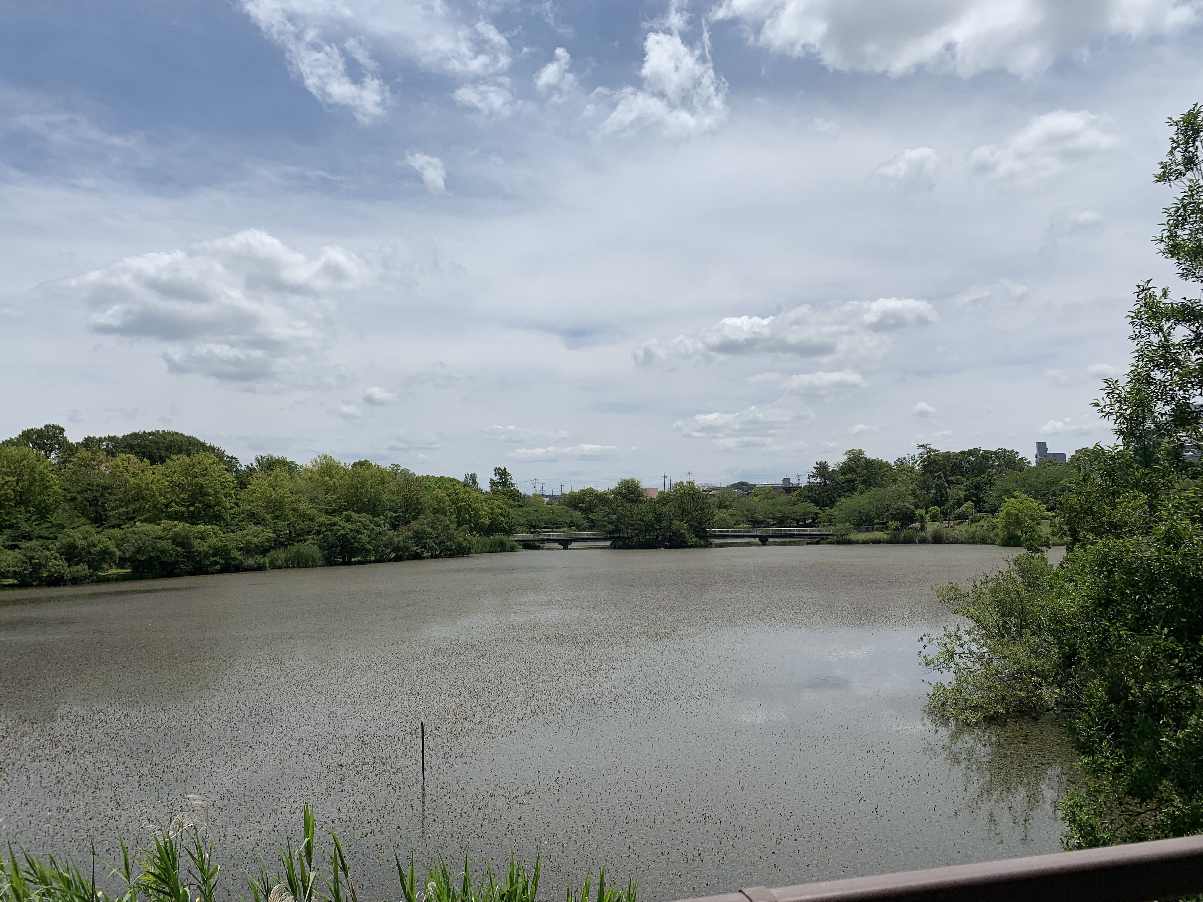 杁ヶ池、2019年6月14日11時16分撮影